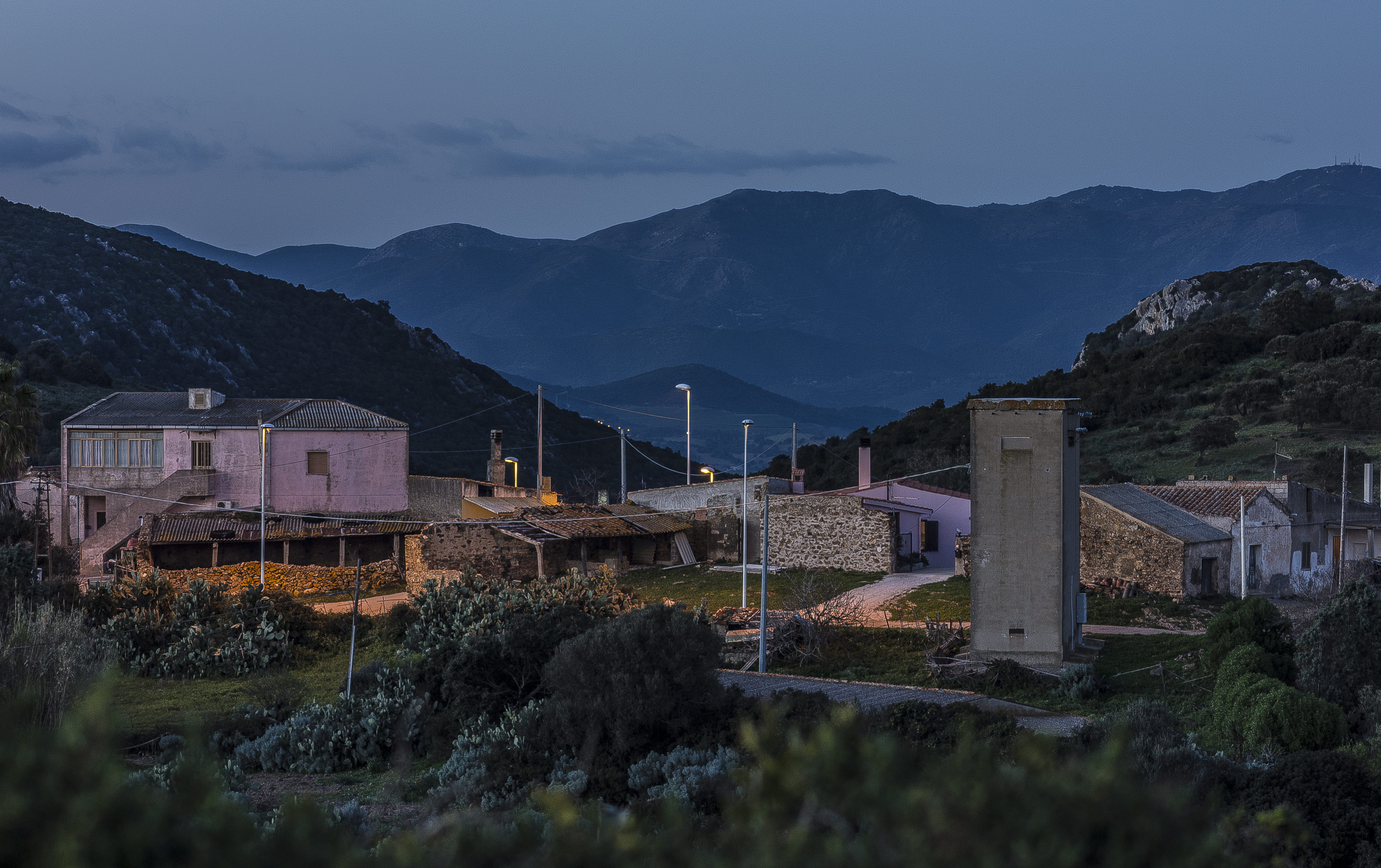 Sirri This is a photo of a monument which is part of cultural heritage of Italy.